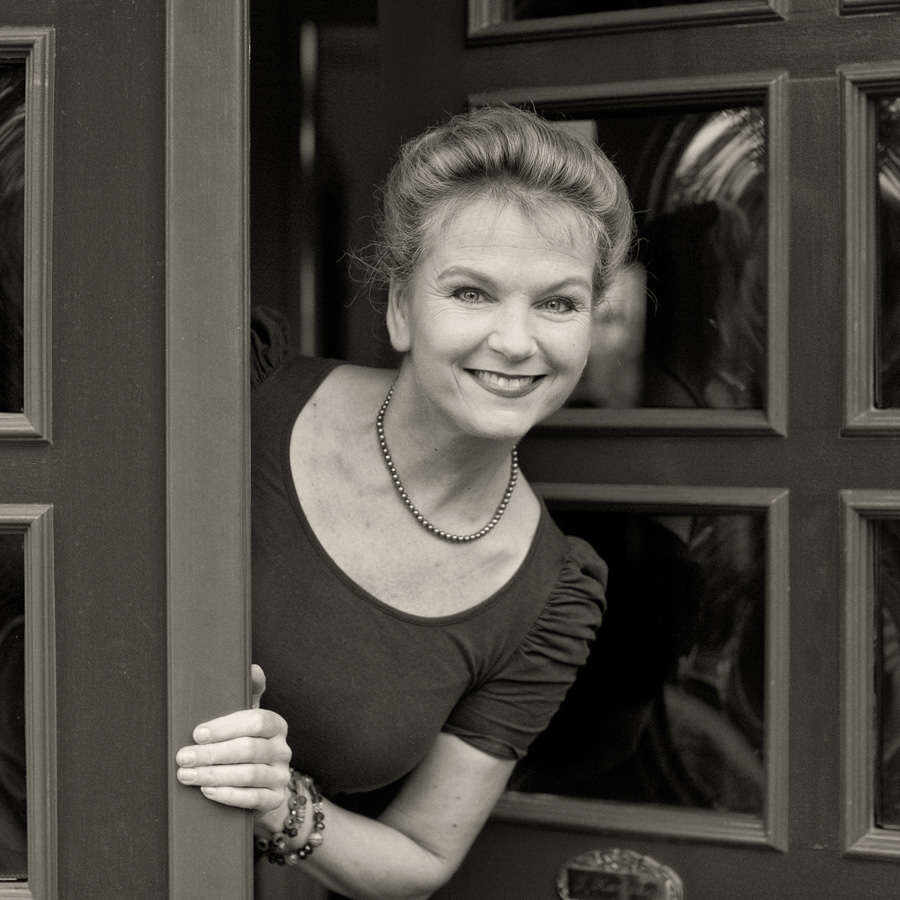 Julia Kempken fotografiert von Andreas Riedel.